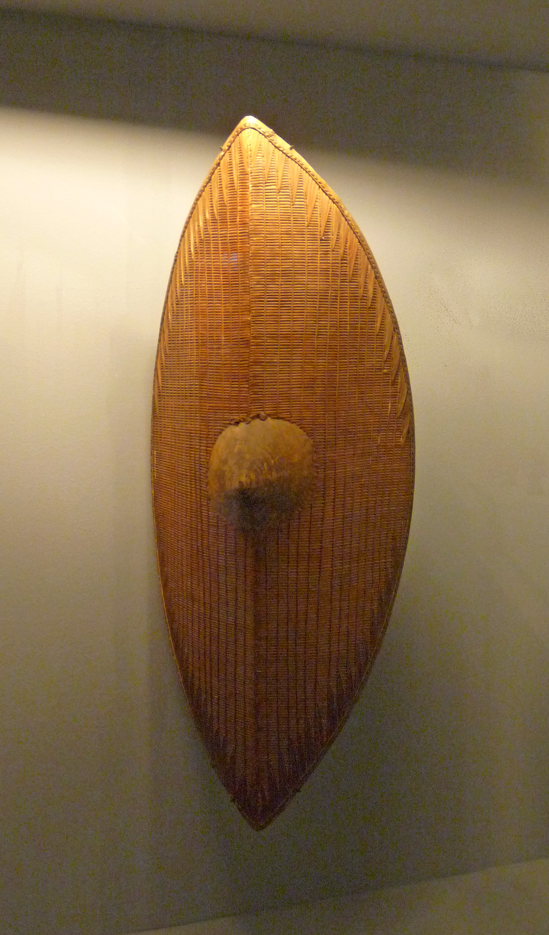 Bouclier, population Ganda, Ouganda, 19e siècle, rotin, bois. Musée du quai Branly.